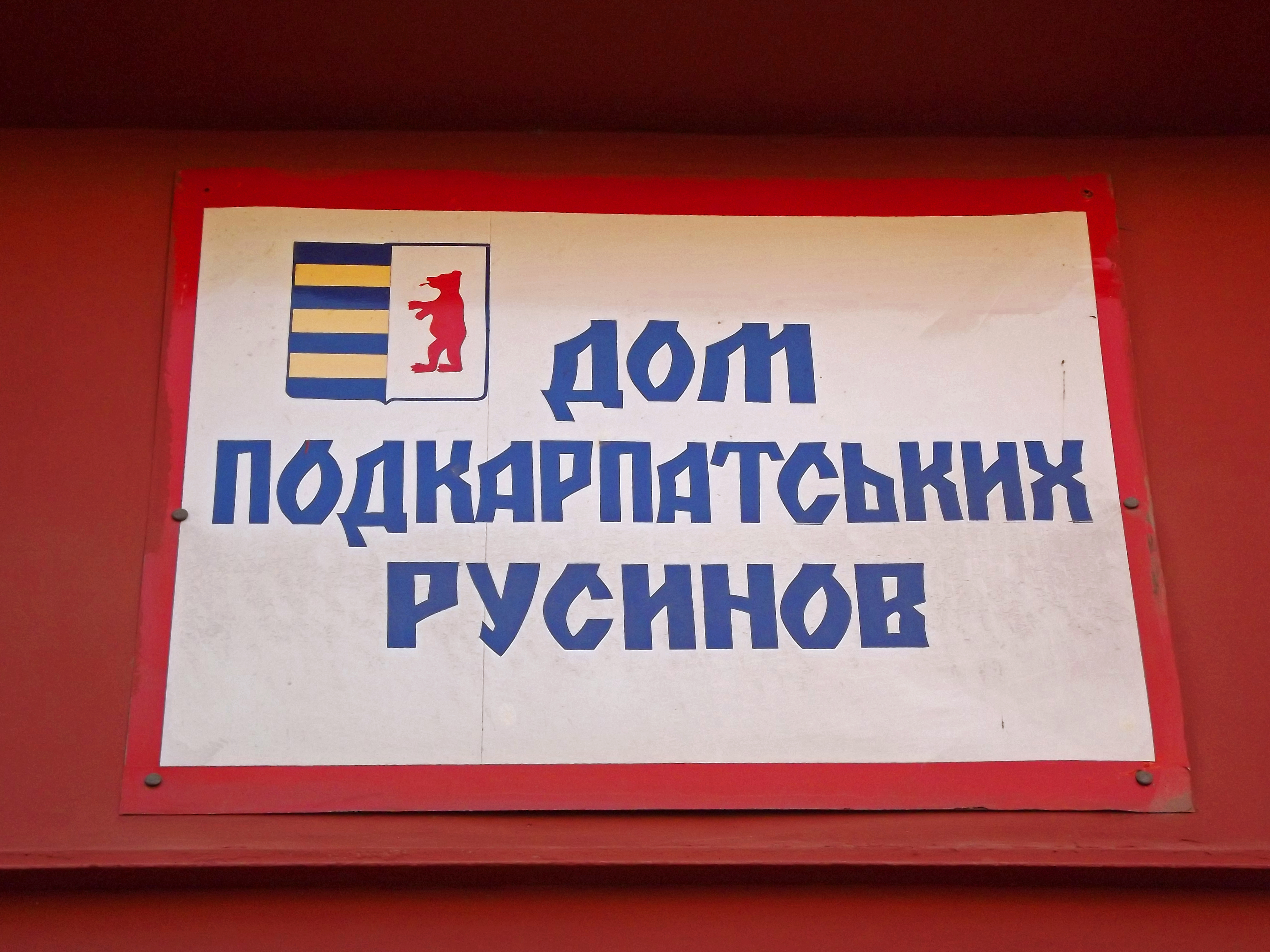 Будинок русинів на пл..Миру,32, Мукачеве, пл.Миру,32